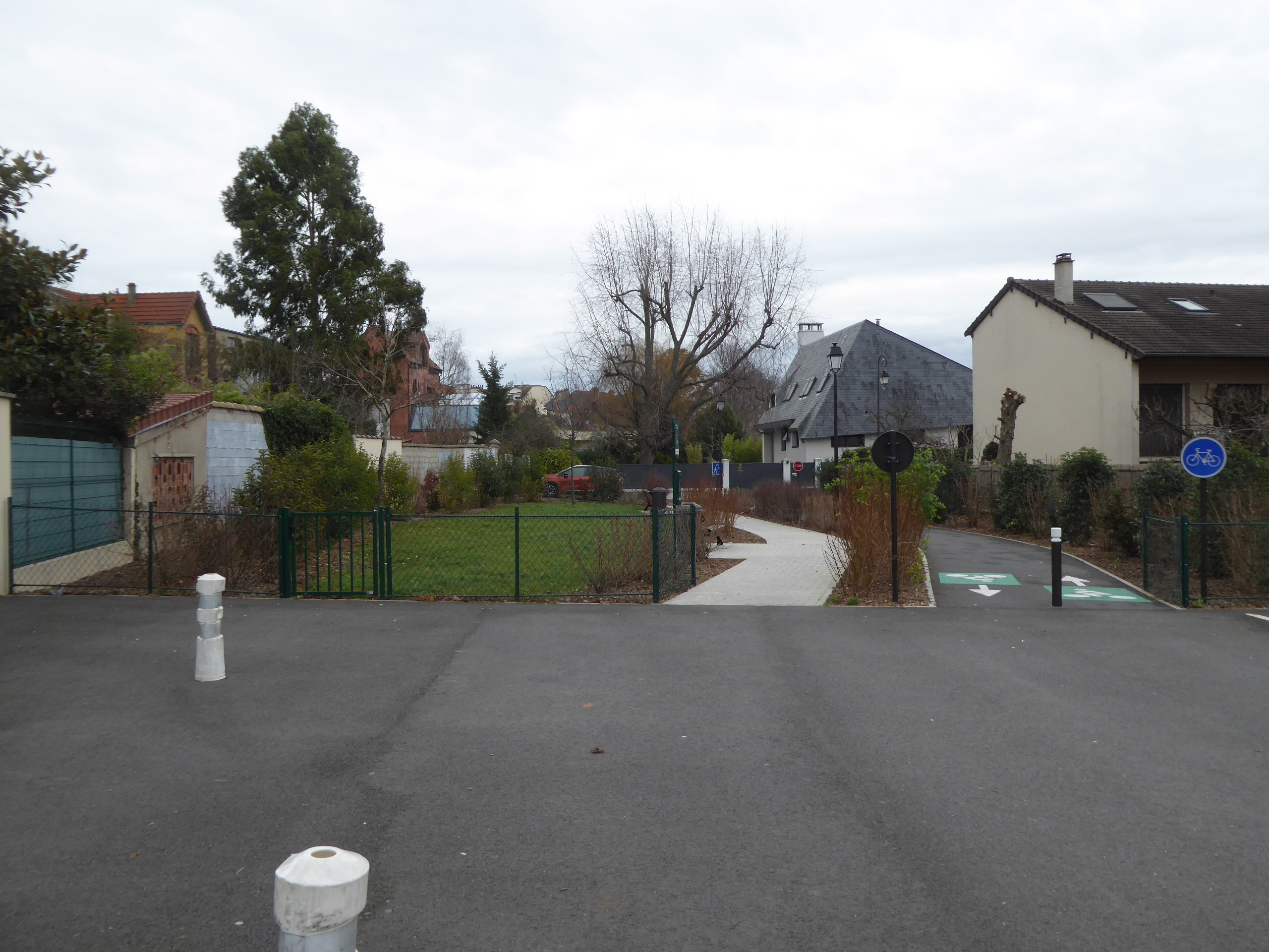 Pistes cyclable et passage piéton vers la rue Coustou ancien parcours de la Bièvre